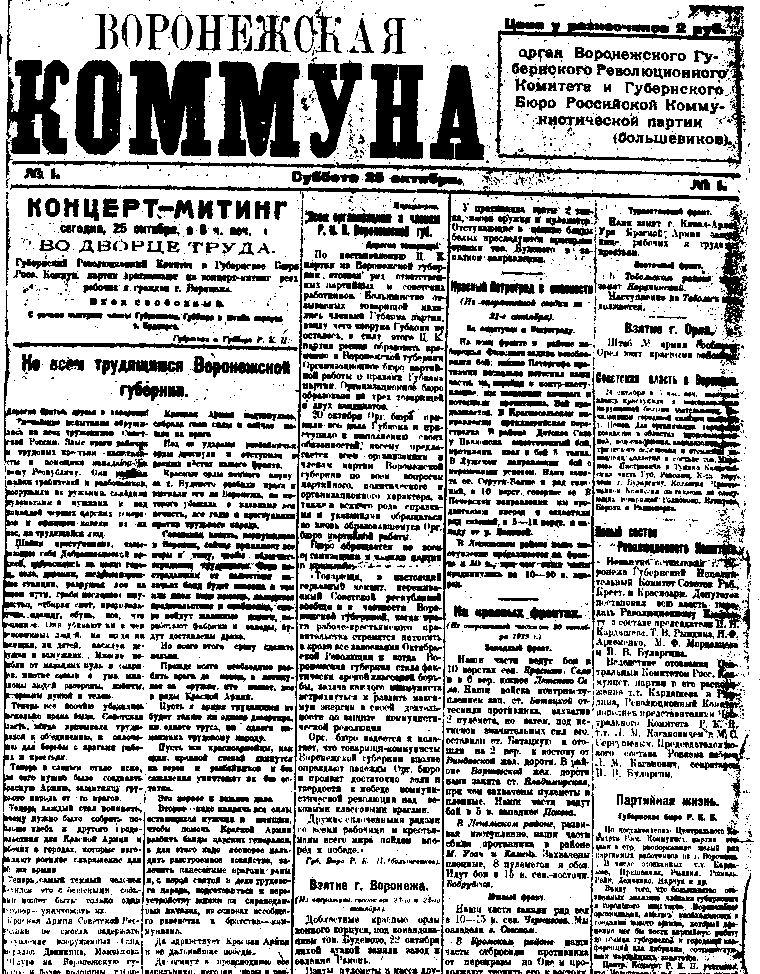 Газета «Воронежская коммуна», 25 октября 1919г.